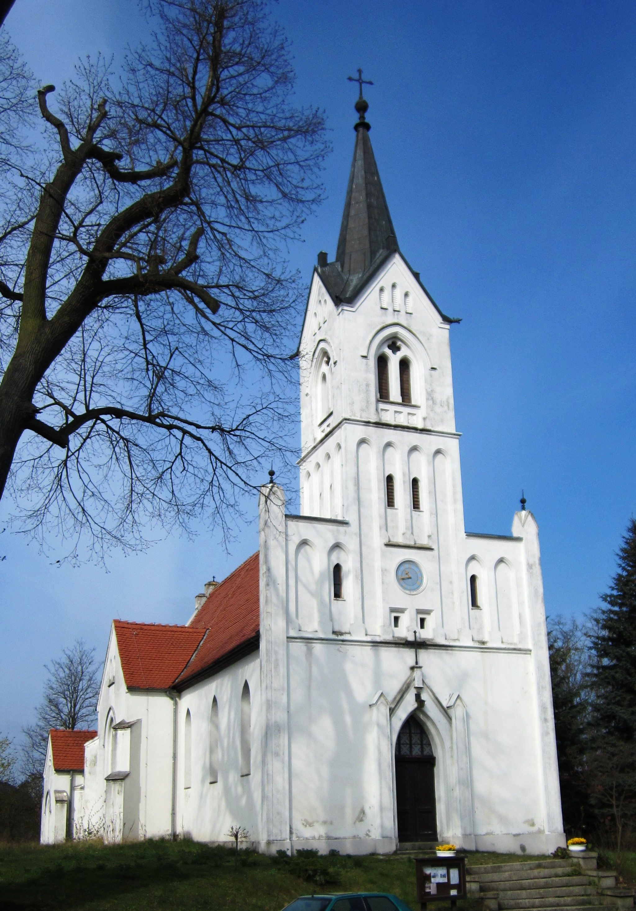 Dorfkirche in Trebnitz (Müncheberg)